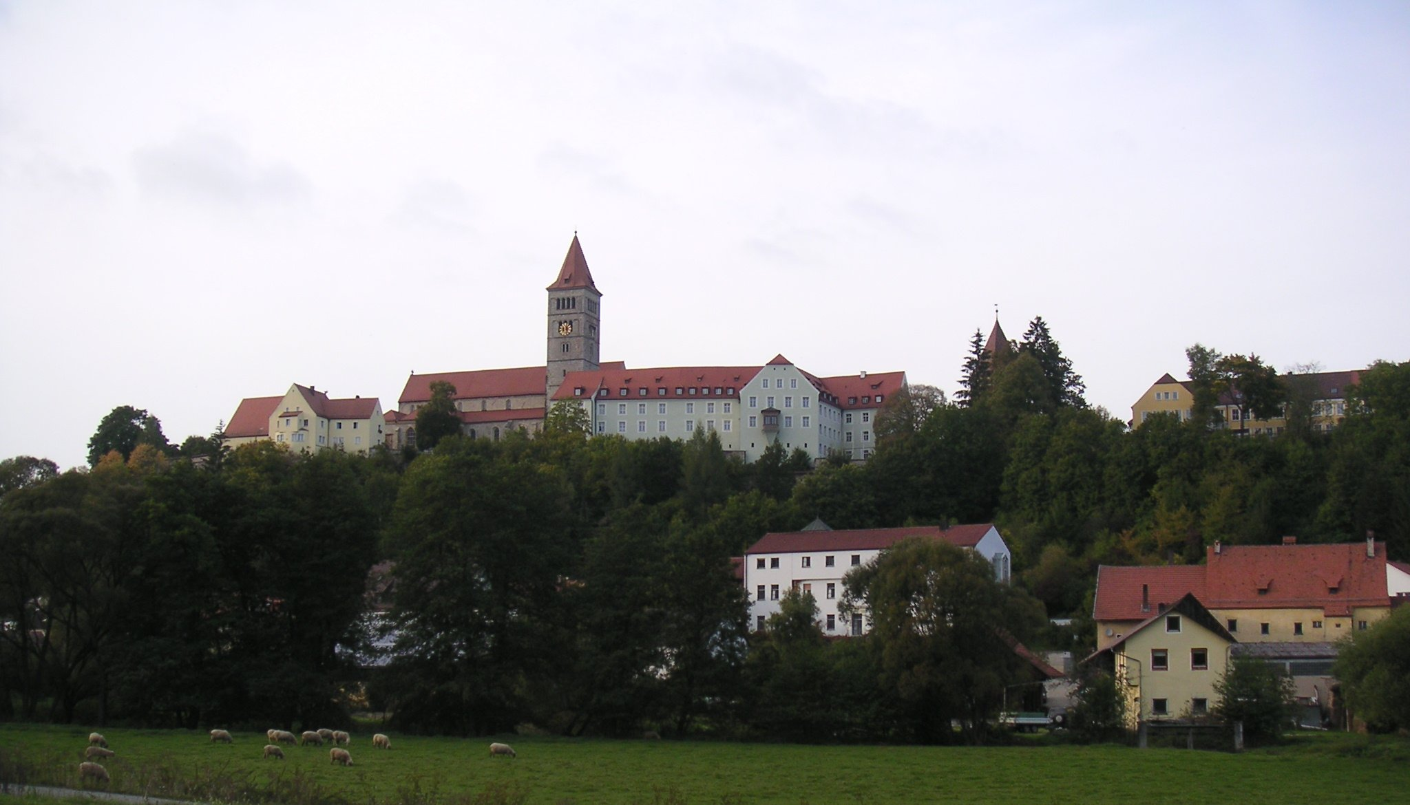 Klosterburg Kastl, von der B299 in Kastl aus aufgenommen